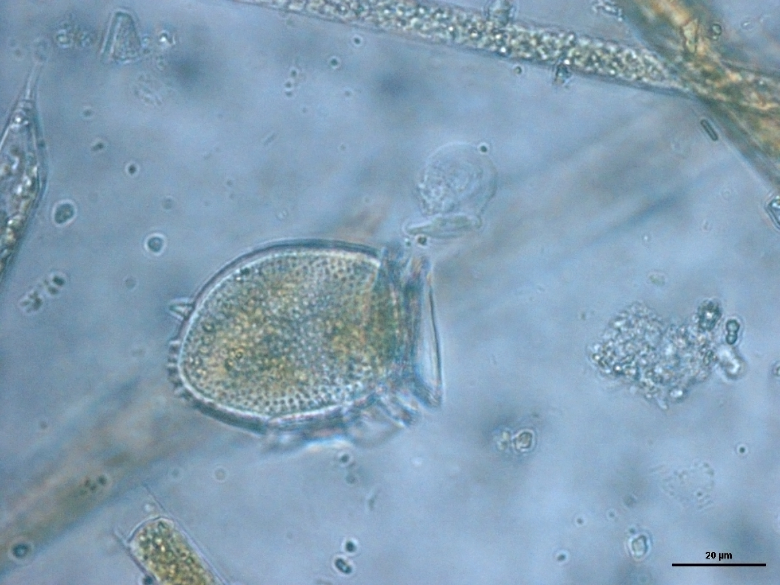 Certaines espèces de Dinophysis sont responsable de nombreuses intoxication par les coquillages